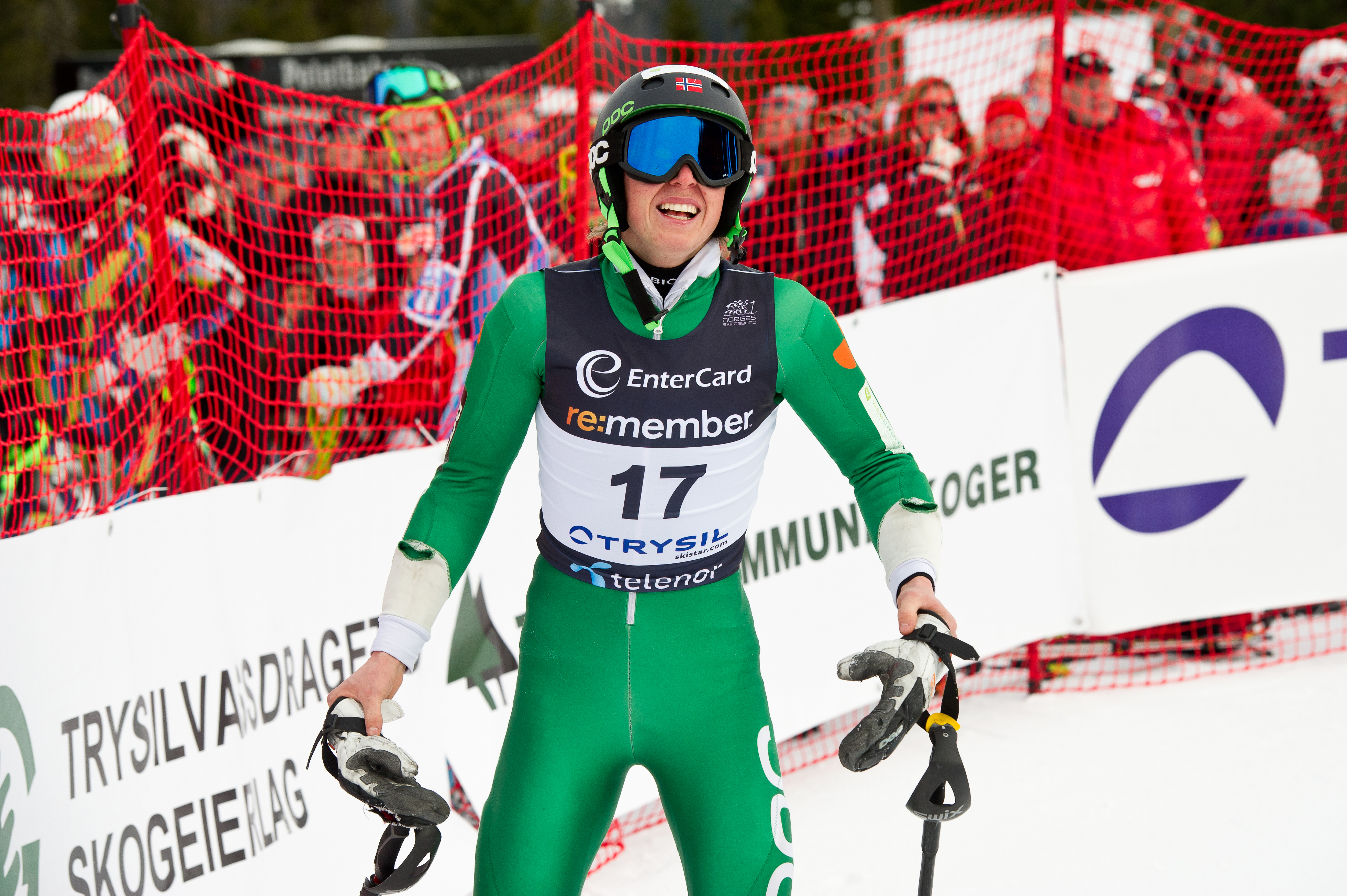 Henrik Kristoffersen tok bronse i NM i slalåm i Trysil. Foto: Ola Matsson